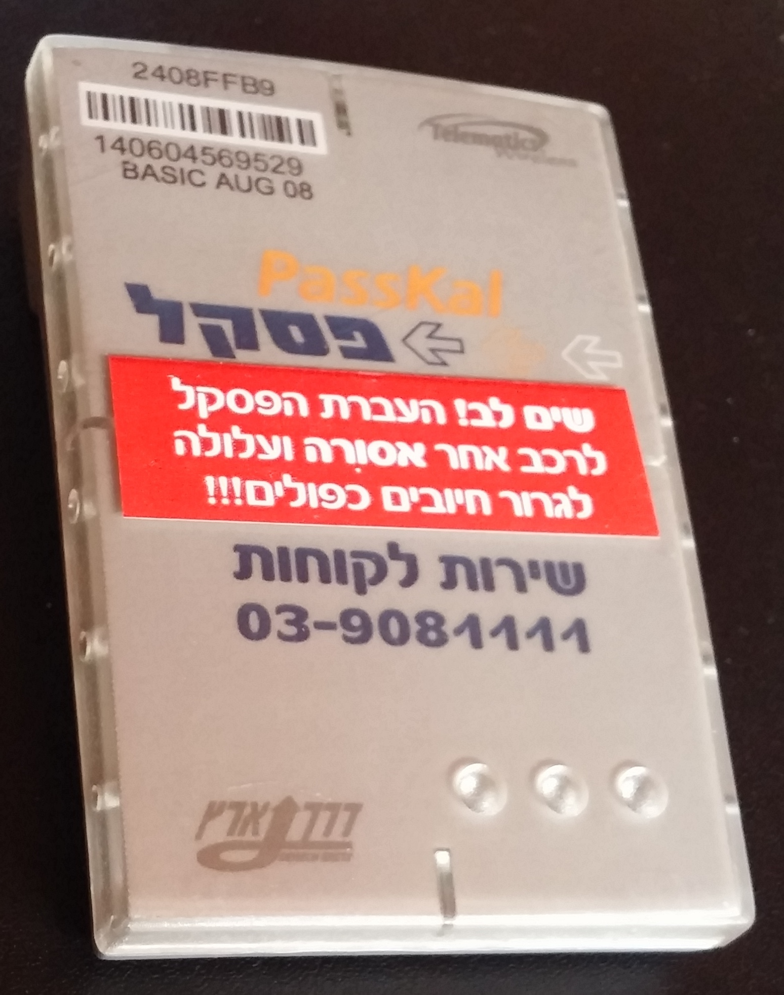 פסקל התקן לזיהוי דיגיטלי של רכב בכביש 6